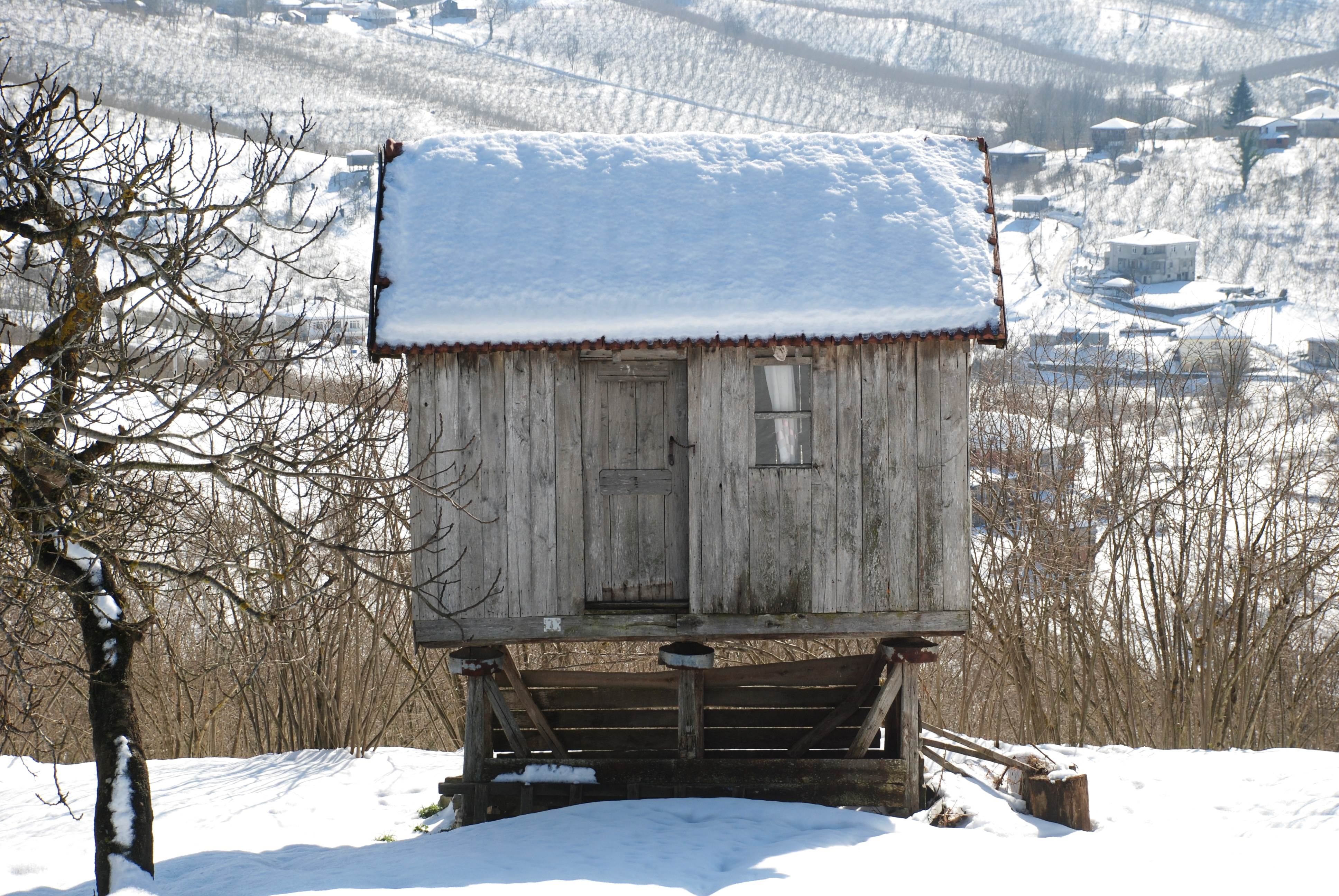 Sakarya, Kocaali ilçesi, Kirazlı köyünde serender. Karadeniz'e özgü geleneksel tahıl ambarı.